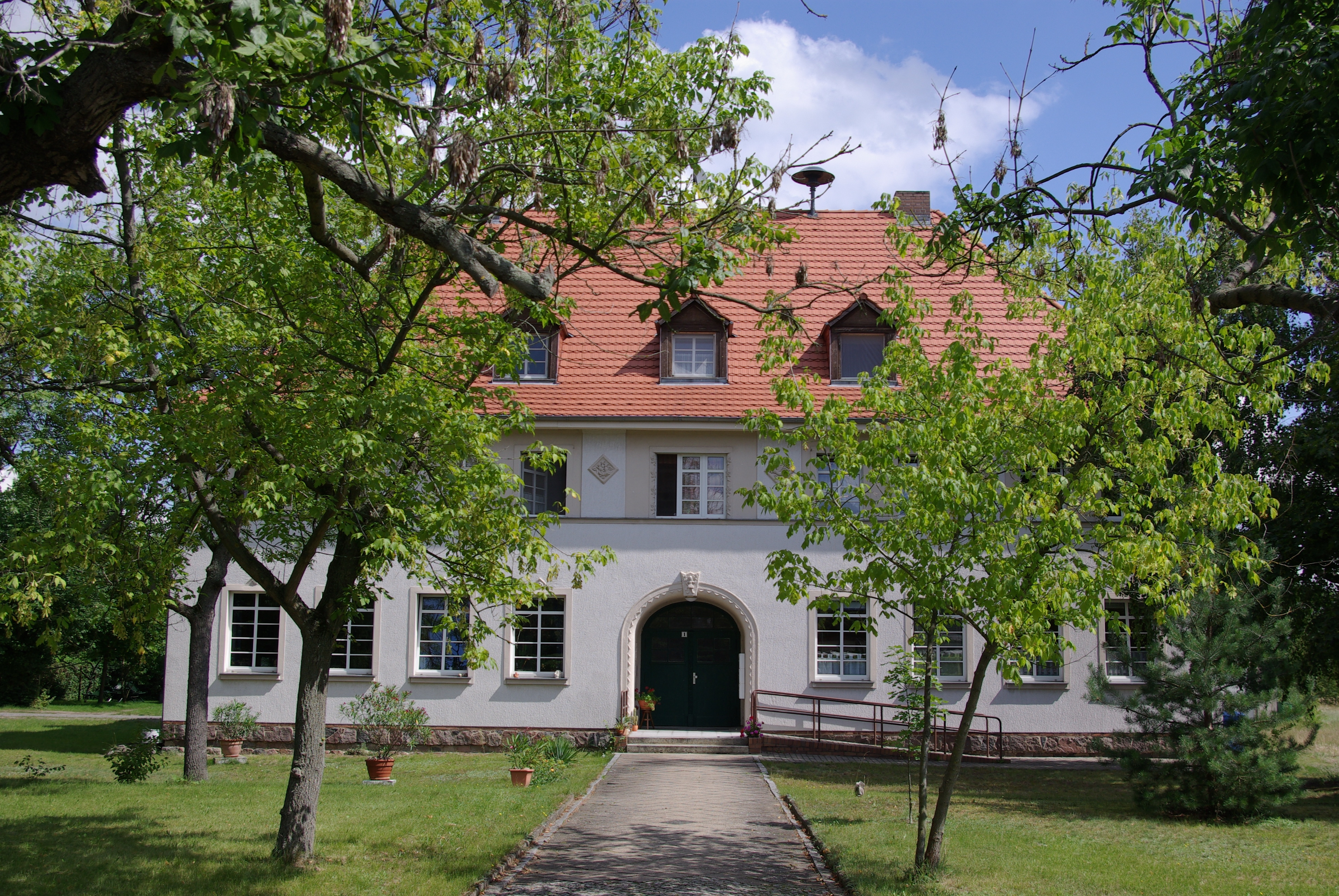 Bad Freienwalde (Oder) Ortsteil Altranft. Das ehemalige Schulgebäude in der Rotdornstraße 1 steht unter Denkmalschutz.